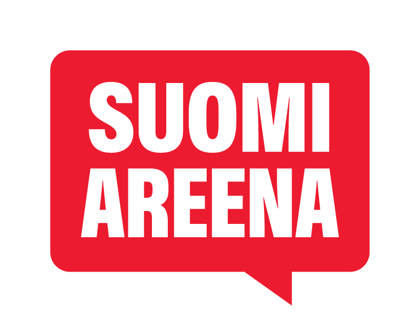 SuomiAreena logo